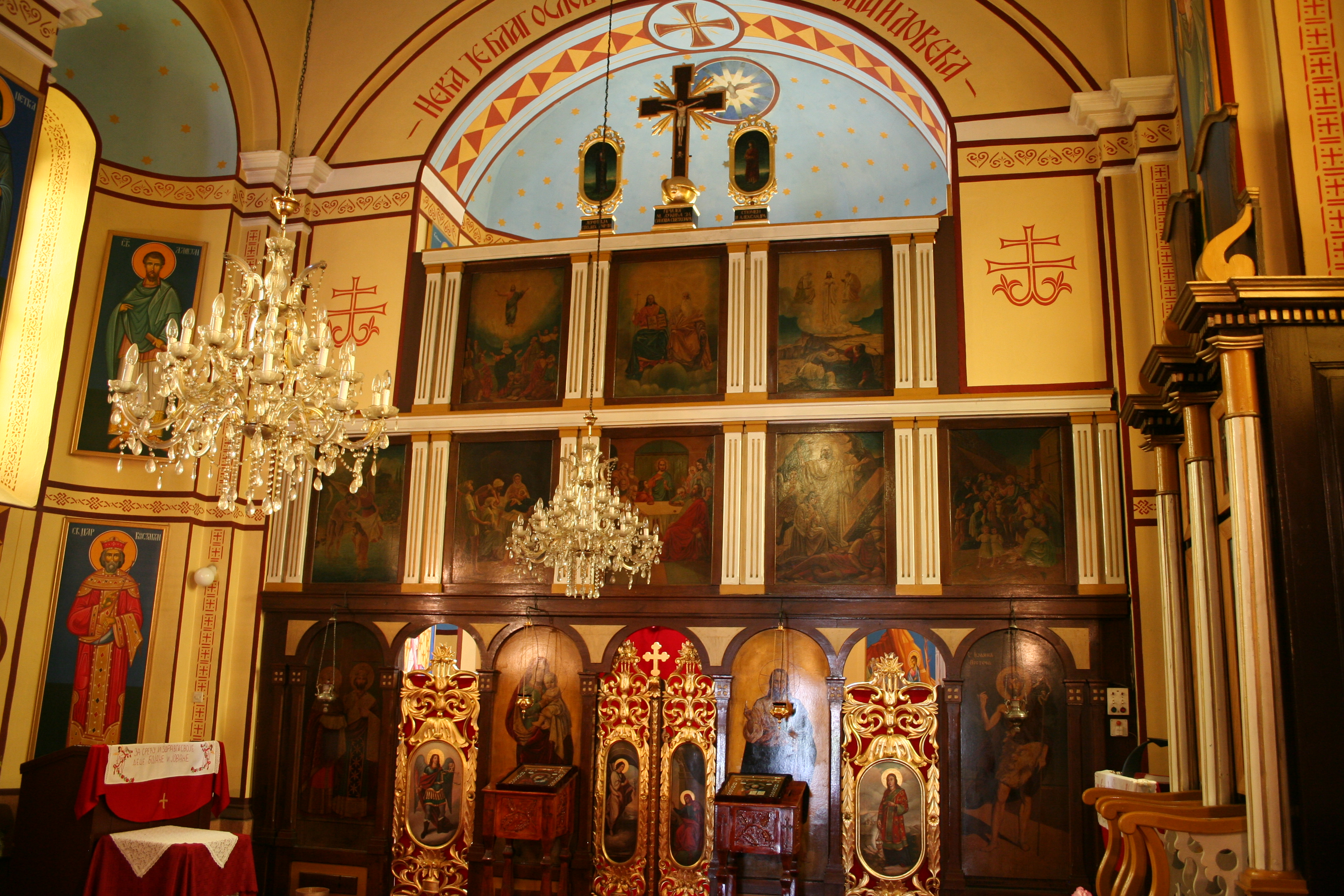 Crkva Sv. Konstantina i Jelene, Koceljeva